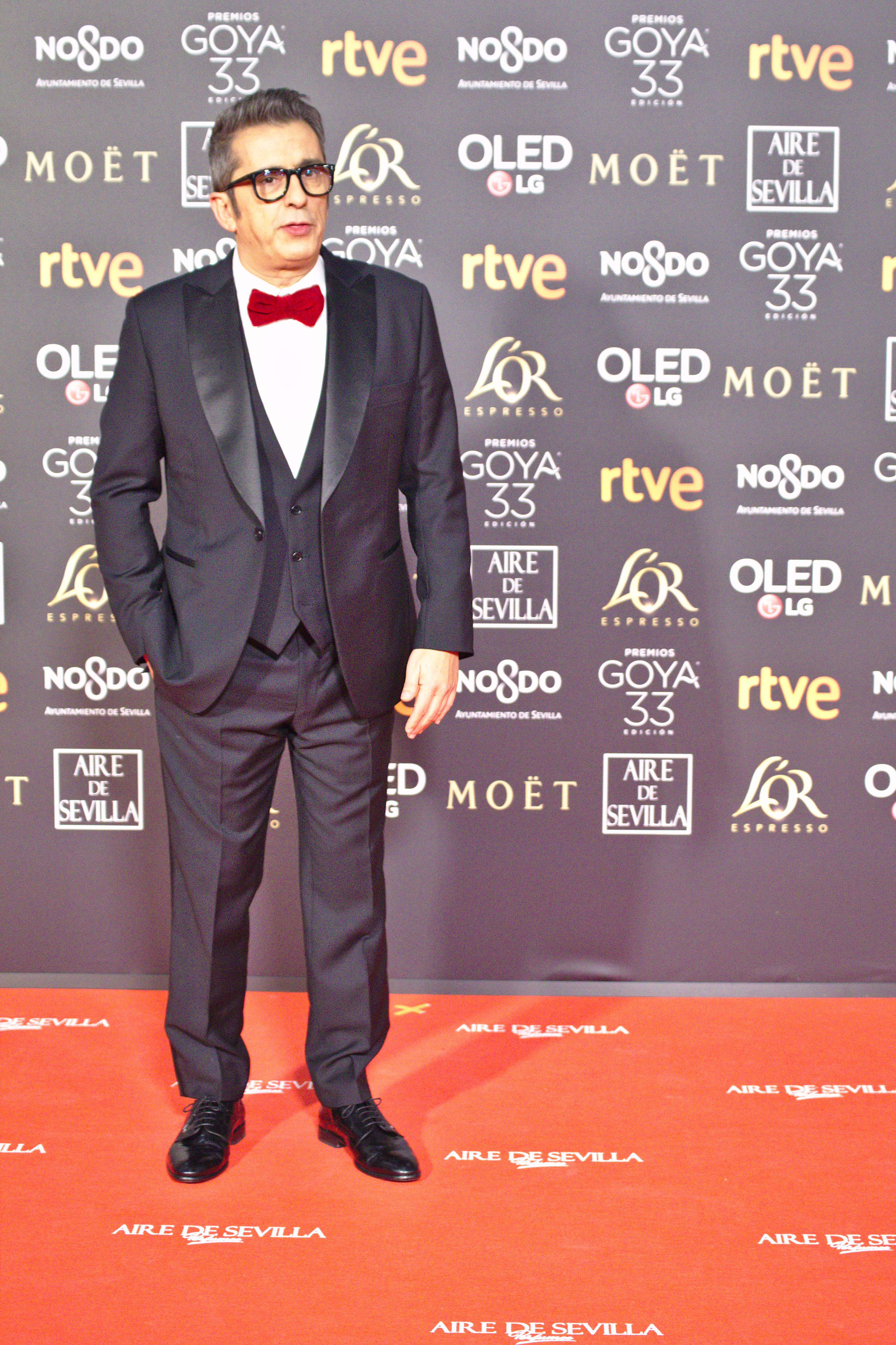 Andreu Buenafuente en la alfombra roja de los Premios Goya celebrados en Sevilla en Febrero 2019